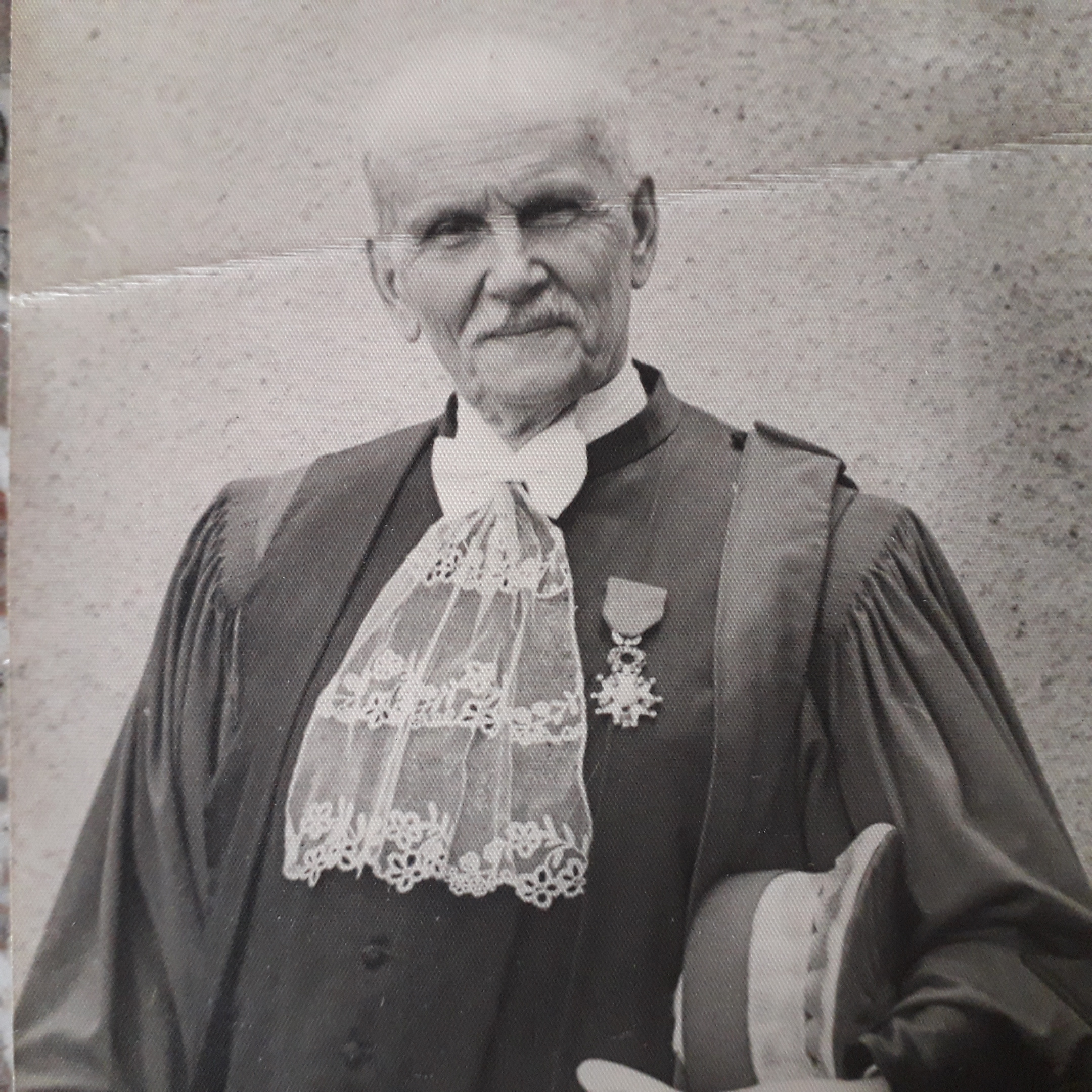 Edmond Durtelle de Saint-Sauveur (1881-1956) est un historien français du droit. Il est professeur de droit de l'université de Rennes et recteur de la faculté.